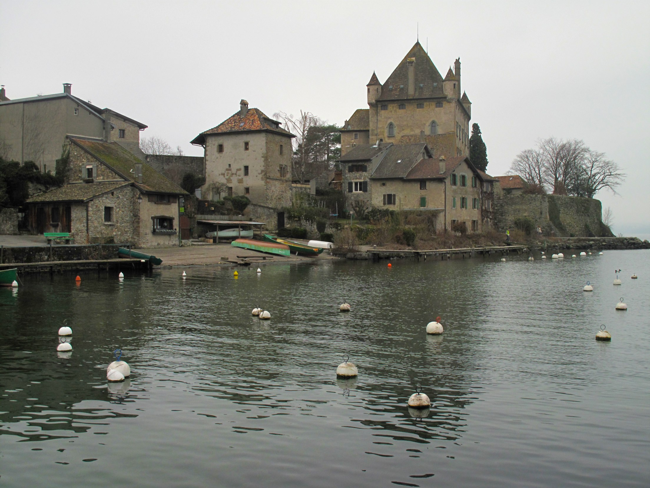 Randonnée de Nyon (VD) -Yvoire (74) à Hermance (GE)